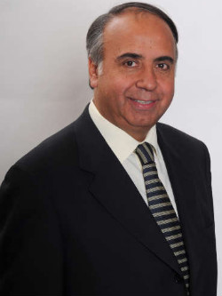 Leopoldo Pérez Lahsen